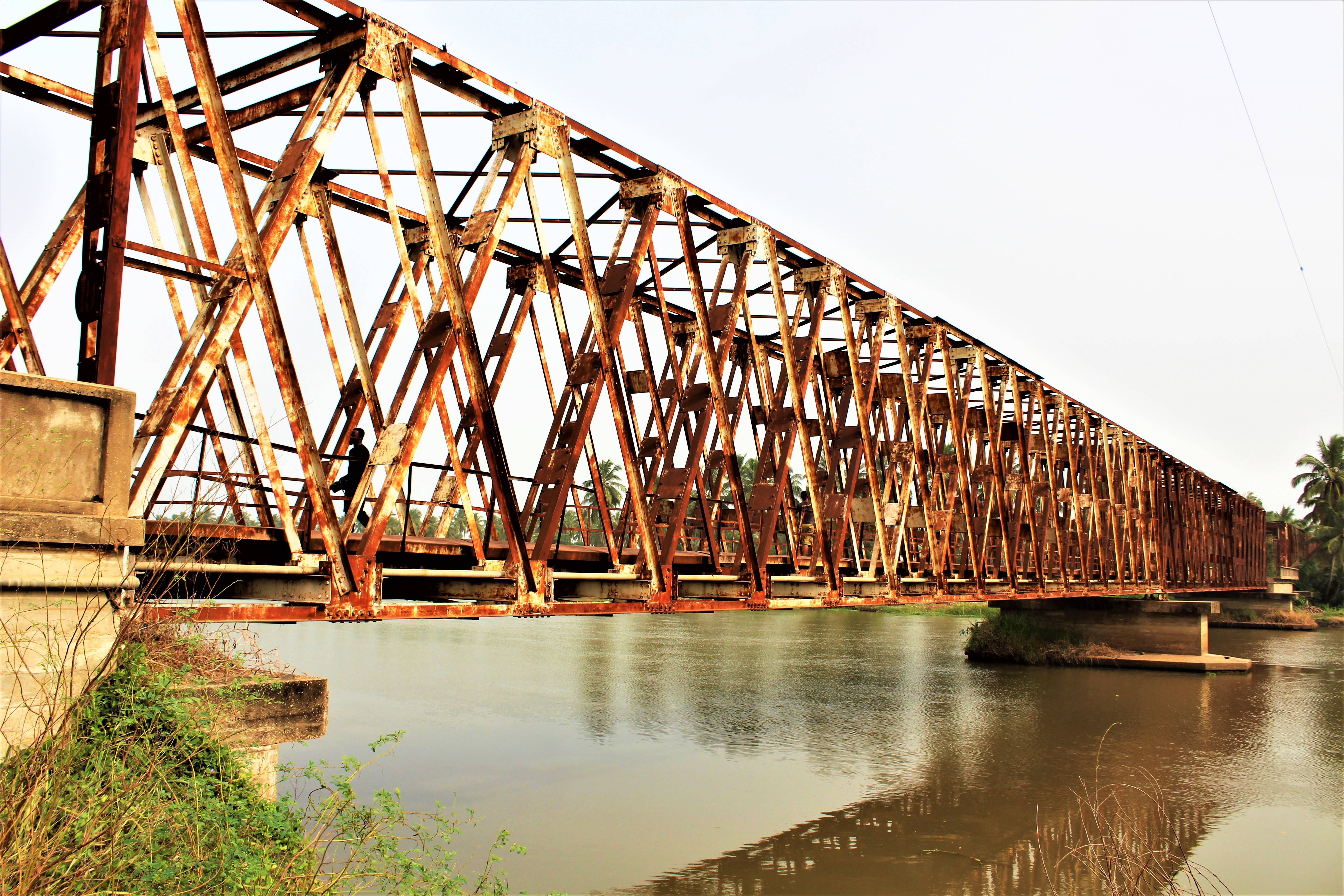 Vue de profil d'un ancien pont non fonctionnel à Grand-Popo au Bénin This is an image with the theme "Africa on the Move or Transport" from: Benin